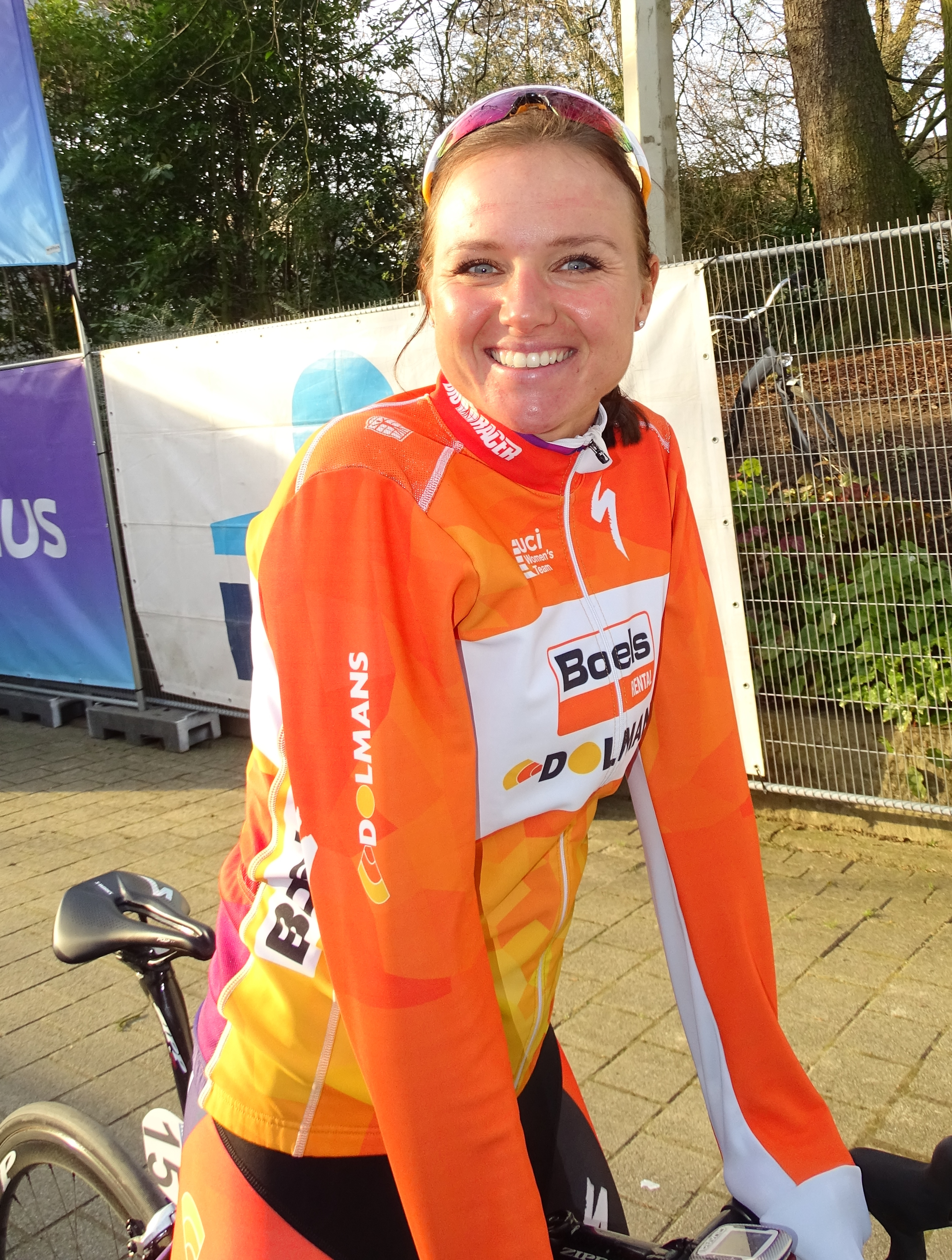 Reportage réalisé le samedi 27 février à l'occasion du départ et de l'arrivée du Circuit Het Nieuwsblad 2016 et de l'arrivée du Circuit Het Nieuwsblad féminin 2016 à Gand, Belgique.